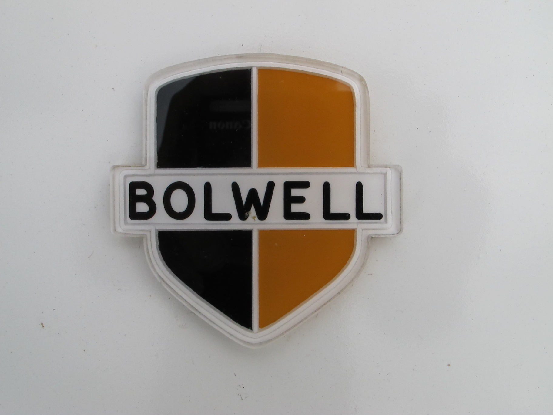 Bolwell car badge